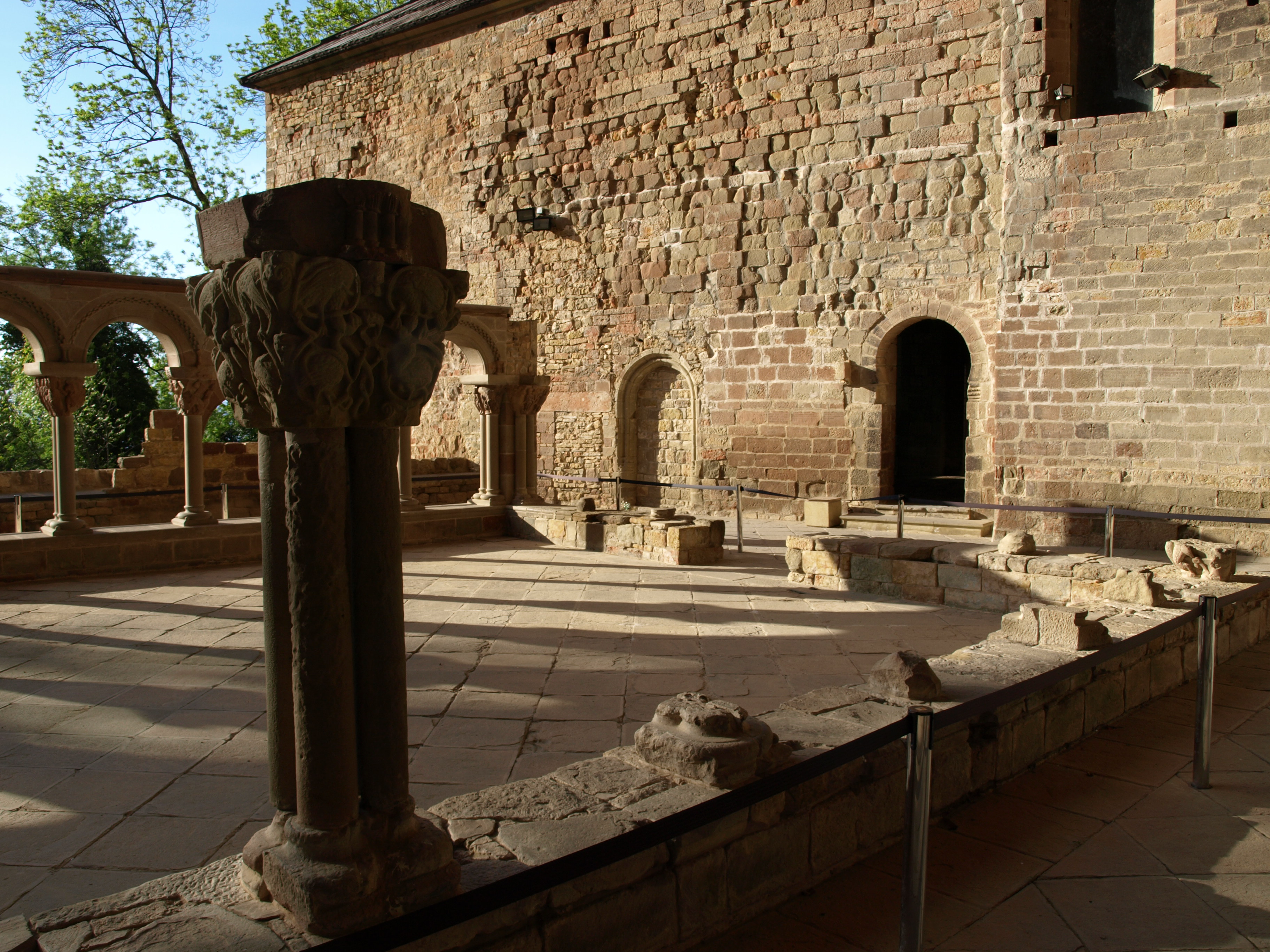 Claustro del Monasterio de San Juan de la Peña (Aragón,España)